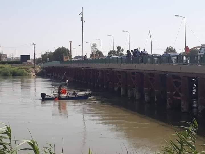 صورة لجسر الزيتون من الجانب الايسر للجسر من جانب صوب الشامية